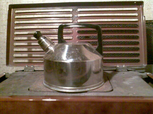 Ein Wasserkessel auf dem heimischen Kohleofen